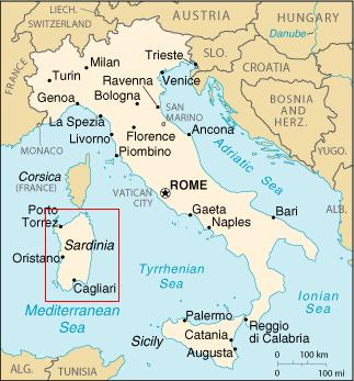 CIA World Factbook kaart van Italie, Sardinie rood omlijnd is enige wijziging